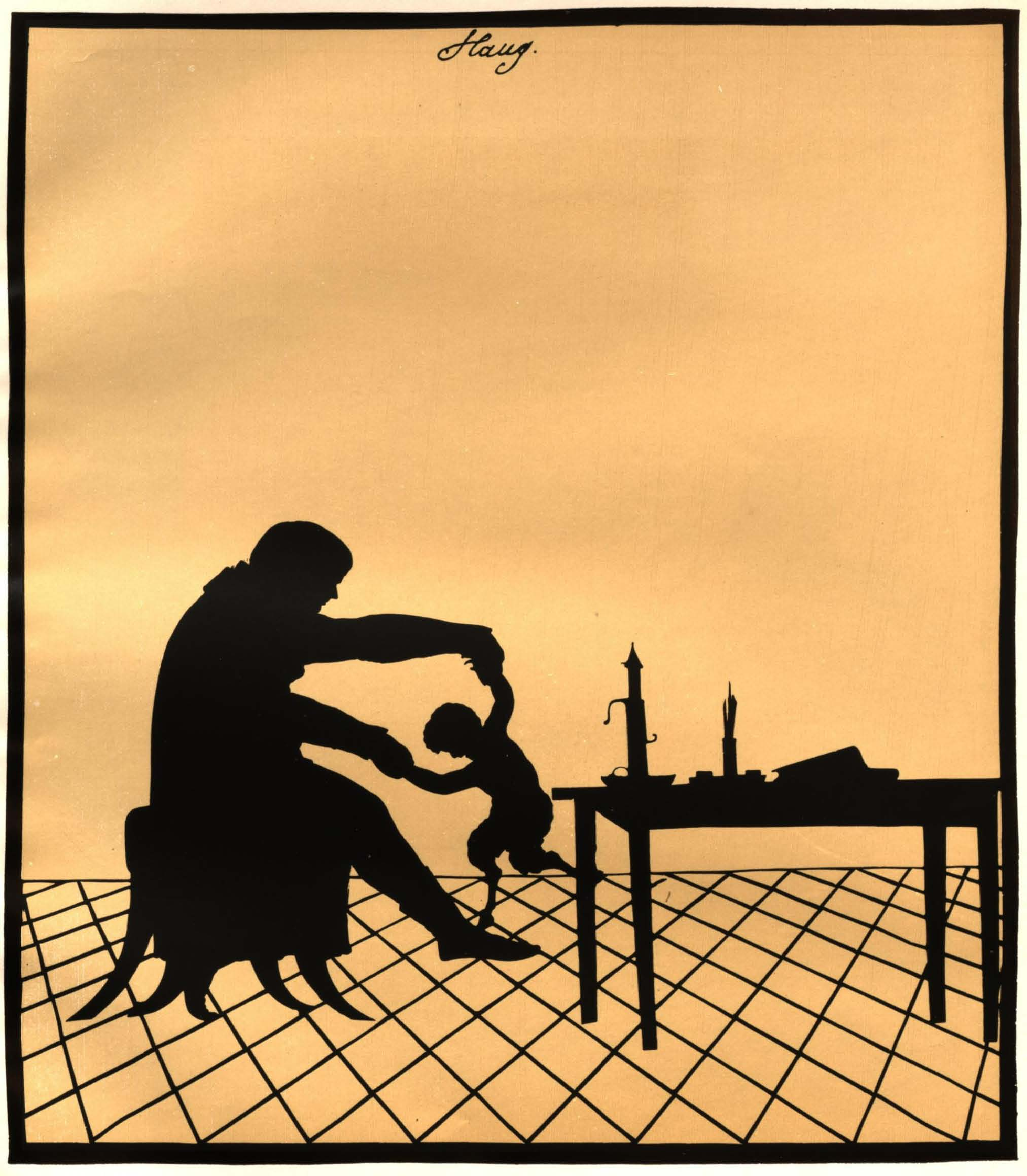 Luise Duttenhofer: Friedrich Haug, einen Faun tanzen lassend, schwarzer Scherenschnitt, Maße, Entstehungsjahr und Standort unbekannt.